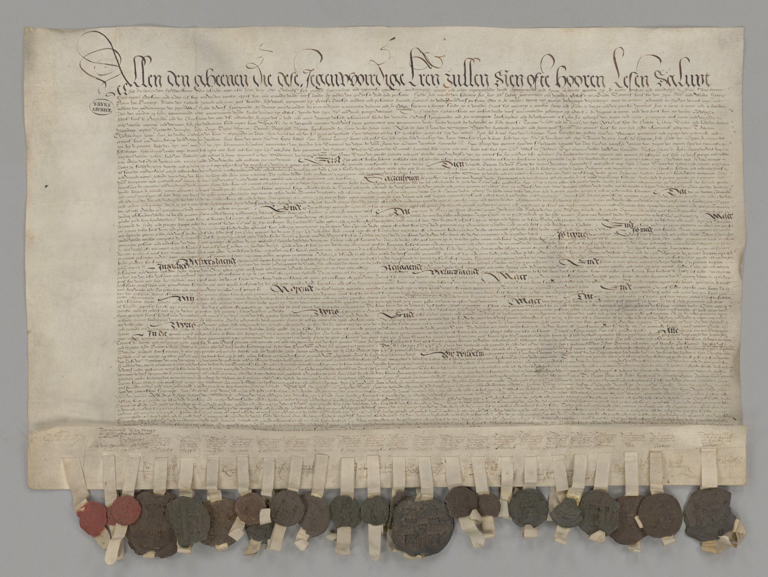 Nationaal Archief, Den Haag, Staten van Holland, 1572-1795: Bruine Kastje, nummer toegang 3.01.04.03, inventarisnummer 26